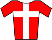 Maillot de Dinamarca